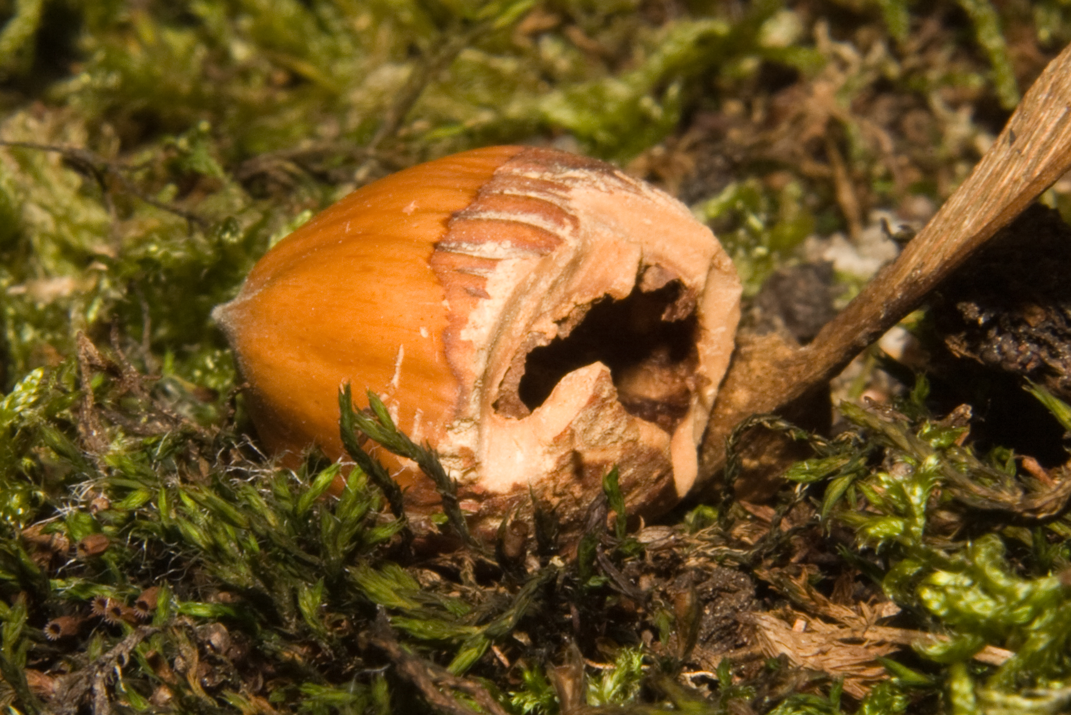 Dieses Bild zeigt eine durch ein europäisches Eichhörnchen (Sciurus vulgaris) geöffnete und entkernte Haselnuss. Typischerweise wird die Haselnuss auf der flachen Seite geöffnet, da der Nager hier mehr Angriffsfläche findet und den Kern der Nuss leichter entfernen kann. Aufgenommen auf dem Pragfriedhof Stuttgart. Ziel war es die typischen Nagespuren eines europäischen Eichhörnchens zu dokumentieren um diese von anderen Nagern (Schadnagern z.B. Ratten, Wühlmäusen) separieren zu können. (Anlass war der 5. Tag des Friedhofs auf dem Stuttgarter Pragfriedhof.)